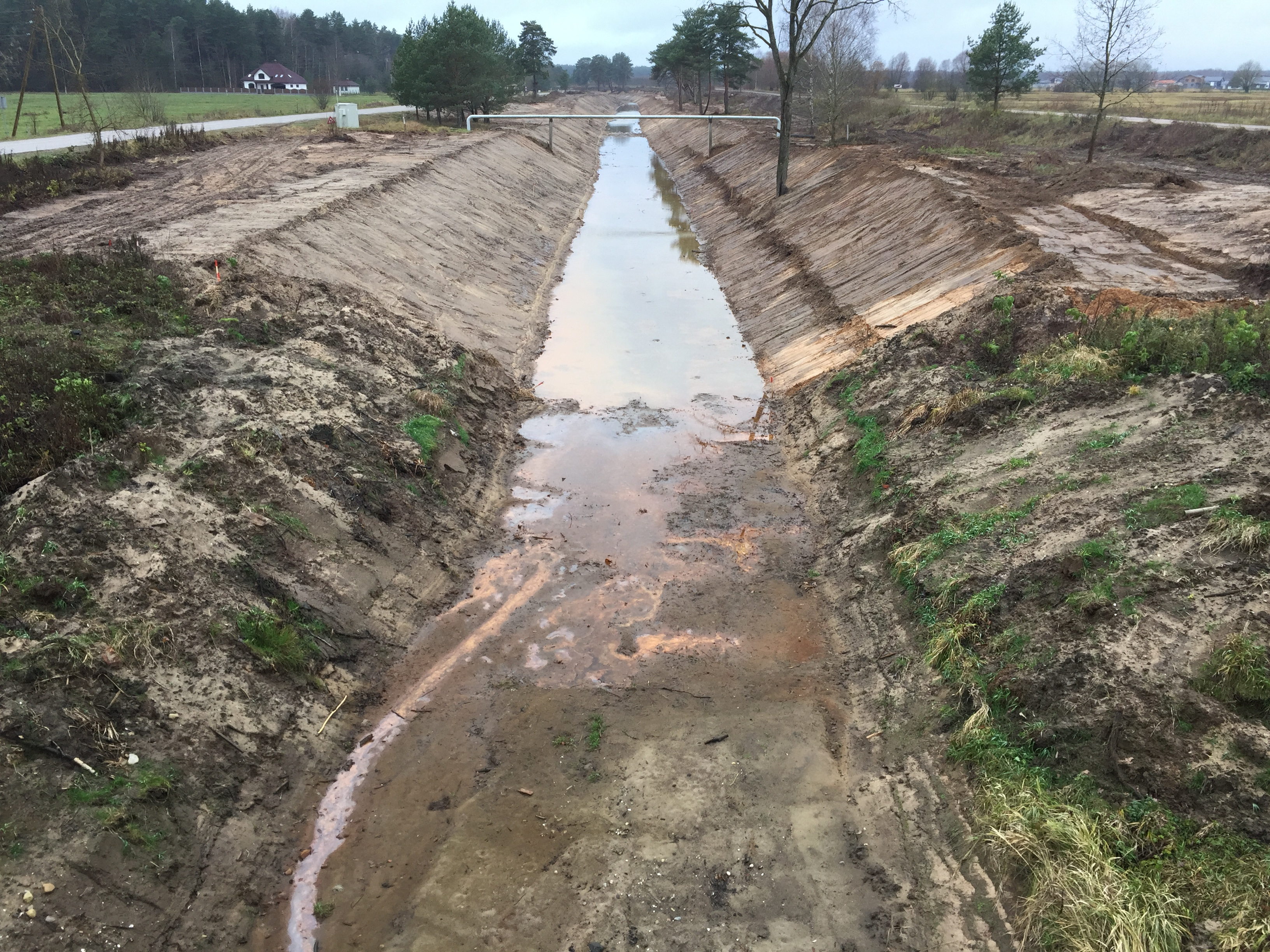 Gaujas-Baltezera kanāls no tilta rietumu virzienā, 2019-11-09